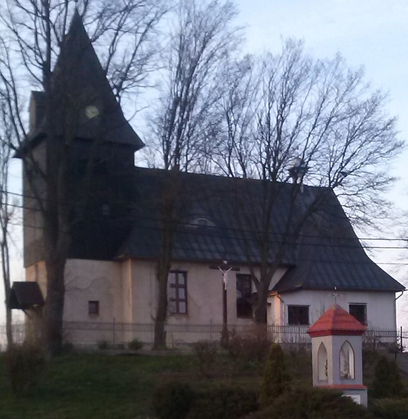 Szropy - rzymskokatolicki kościół filialny p.w. śś. Apostołów Piotra i Pawła, 1647, 1820, po 1930